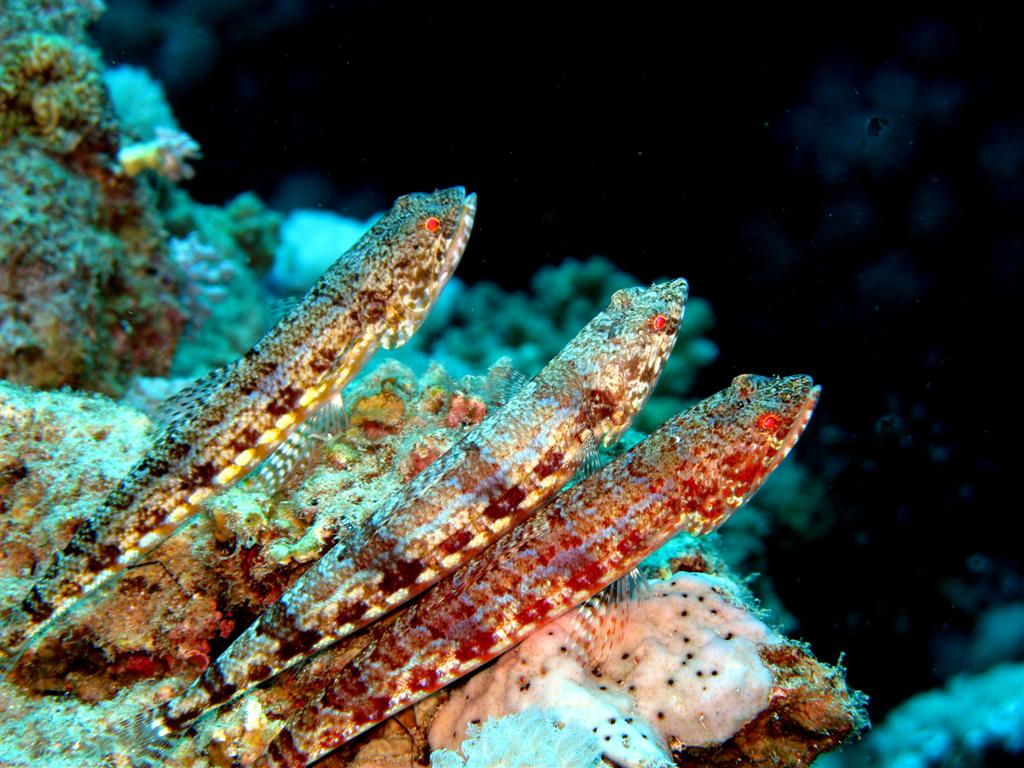 Egypt-Sinai-Dahab